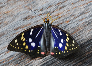 Sasakia charonda. 自分で撮影, 撮影場所：長野県上田市